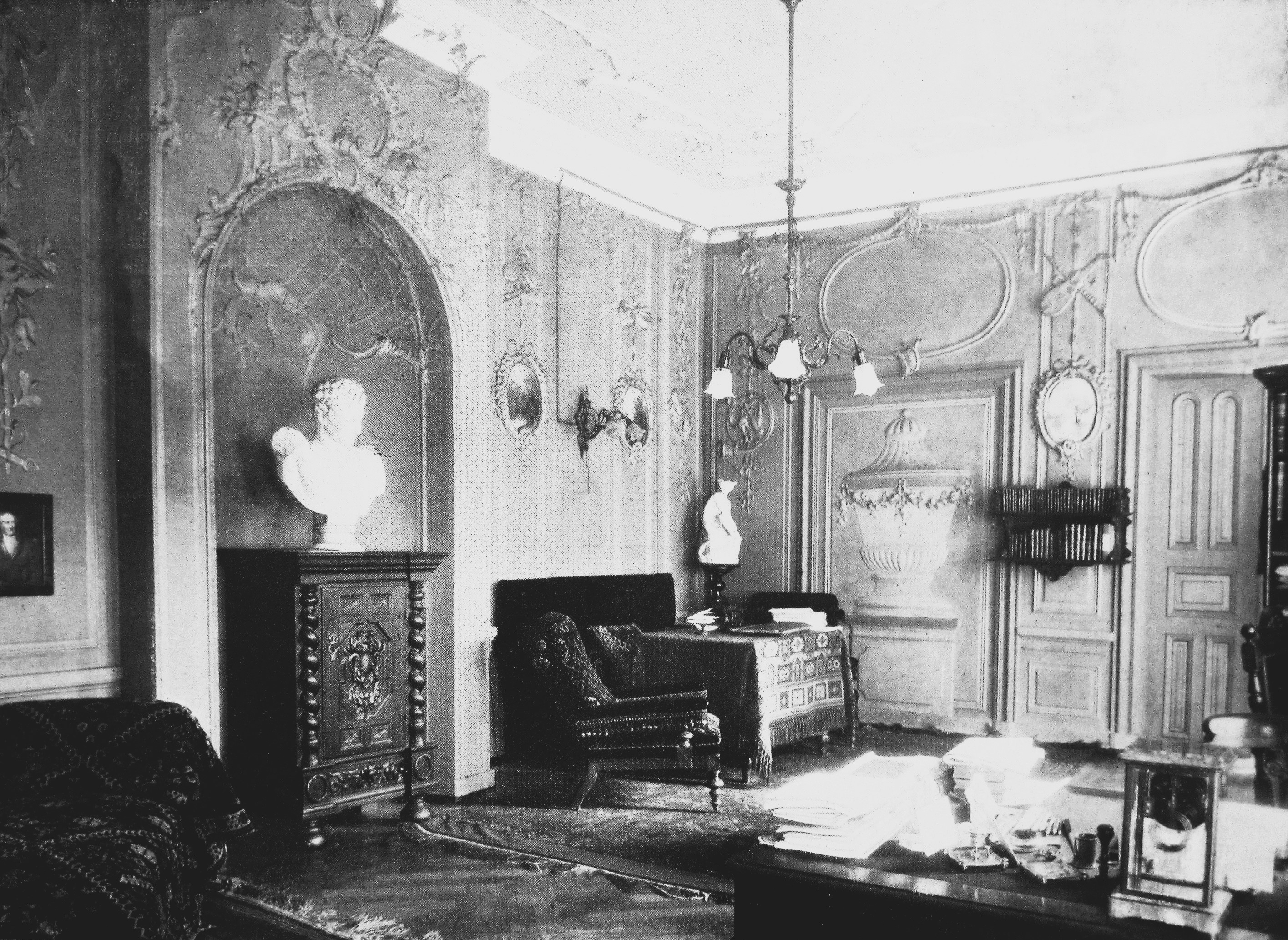 Arbeitszimmer des Lübecker Senators Julius Vermehren im Hause Königstraße 39 in Lübeck um 1900.